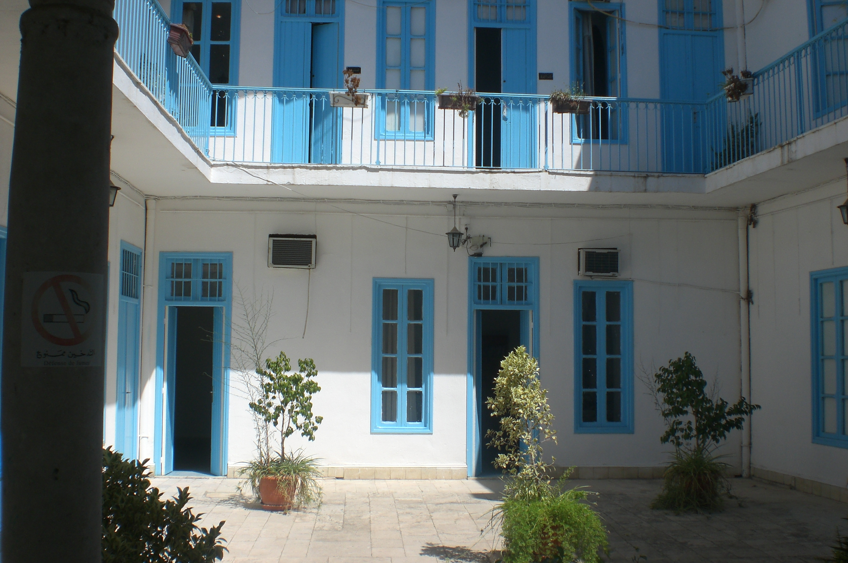 Cour de la médersa Salhia